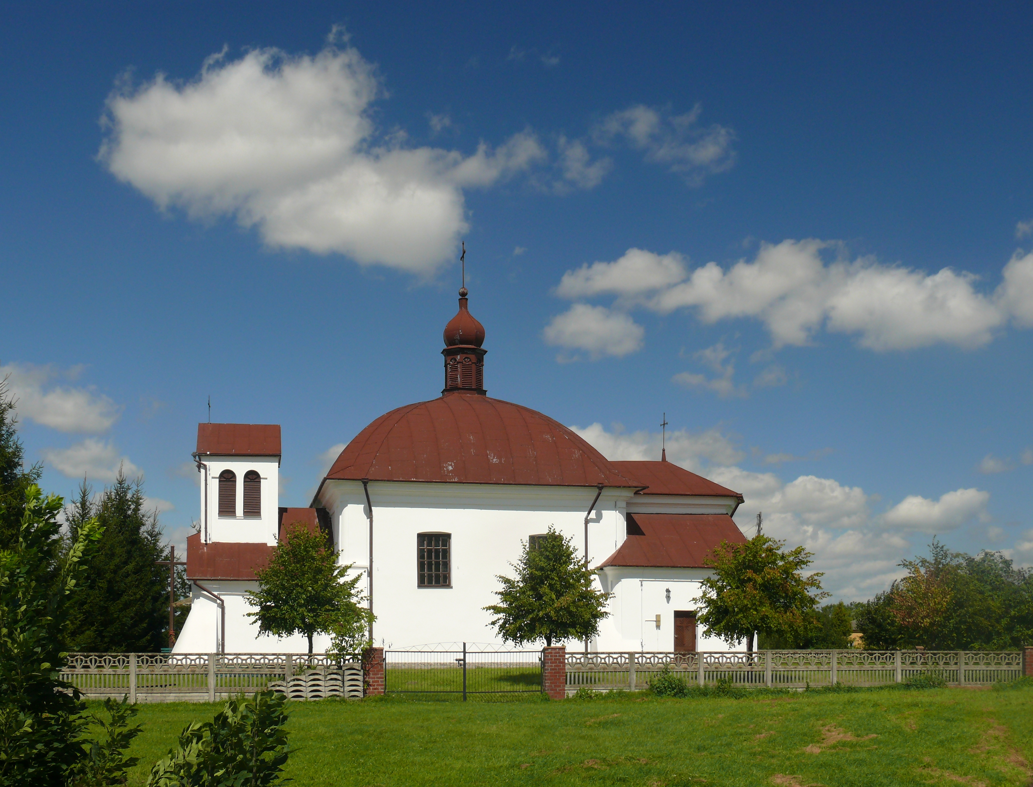 kościół parafialny w Modryniu